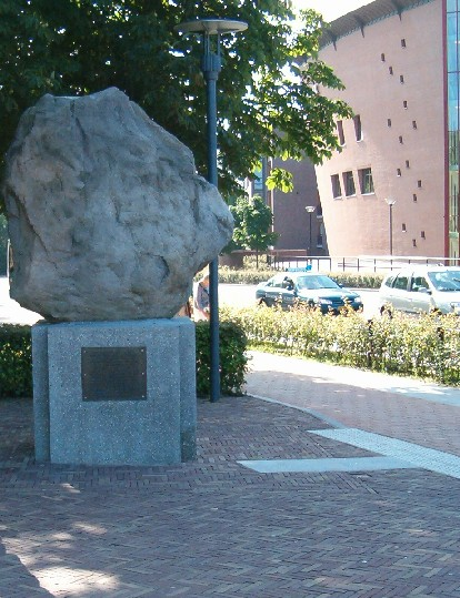 De Amersfoortse Kei